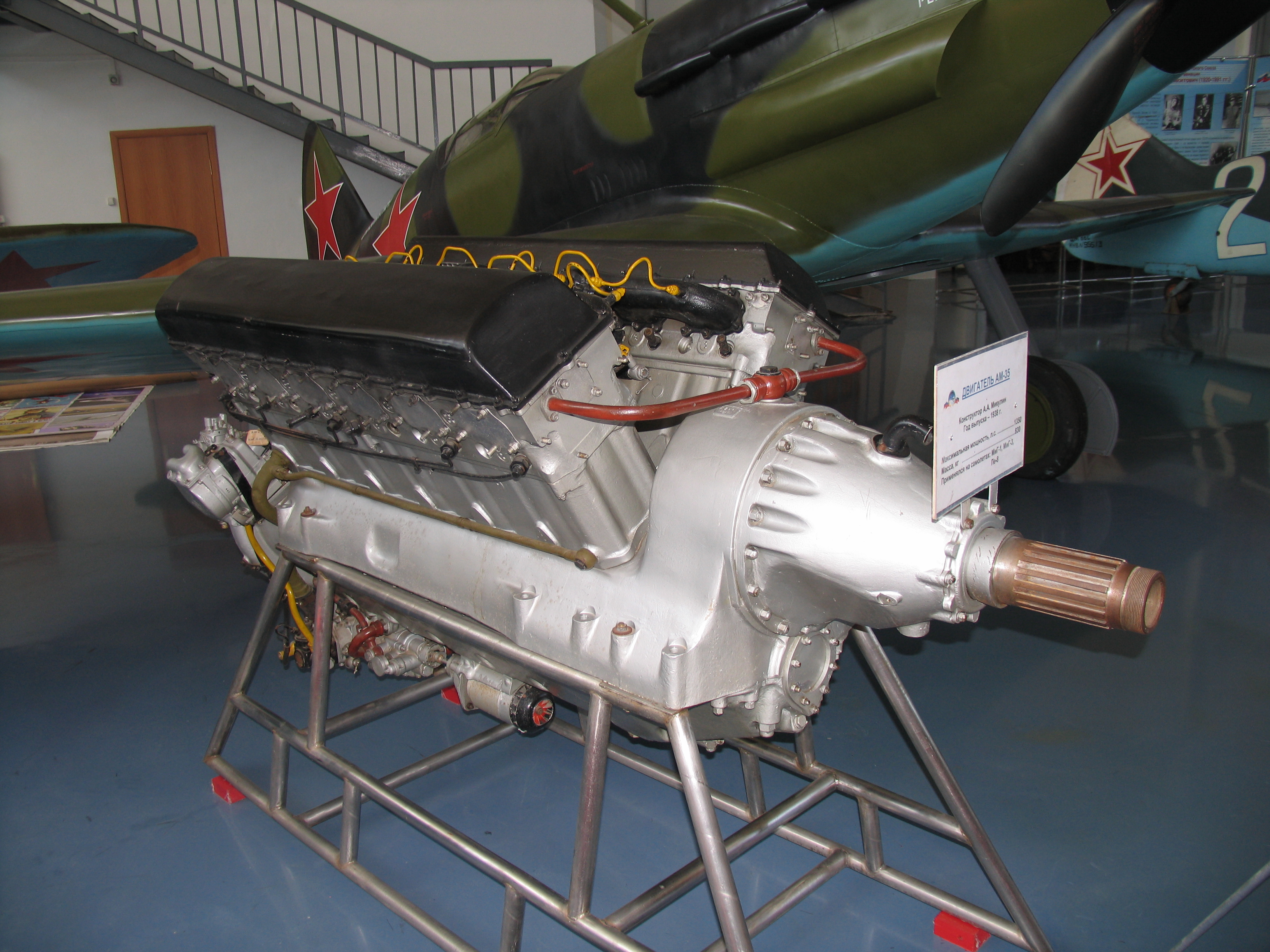 Двигатель АМ-35. Музей ВВС.